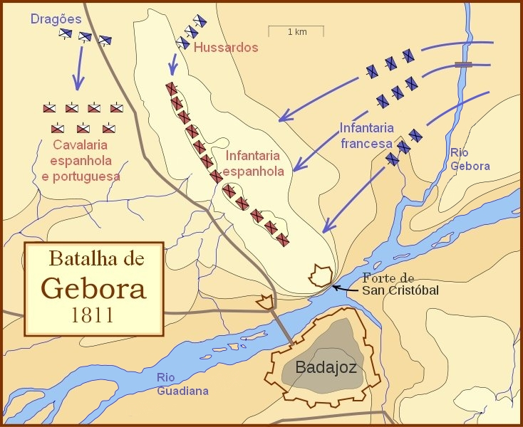 Distribuição das forças na Batalha de Gebora (19 de Fevereiro de 1811)